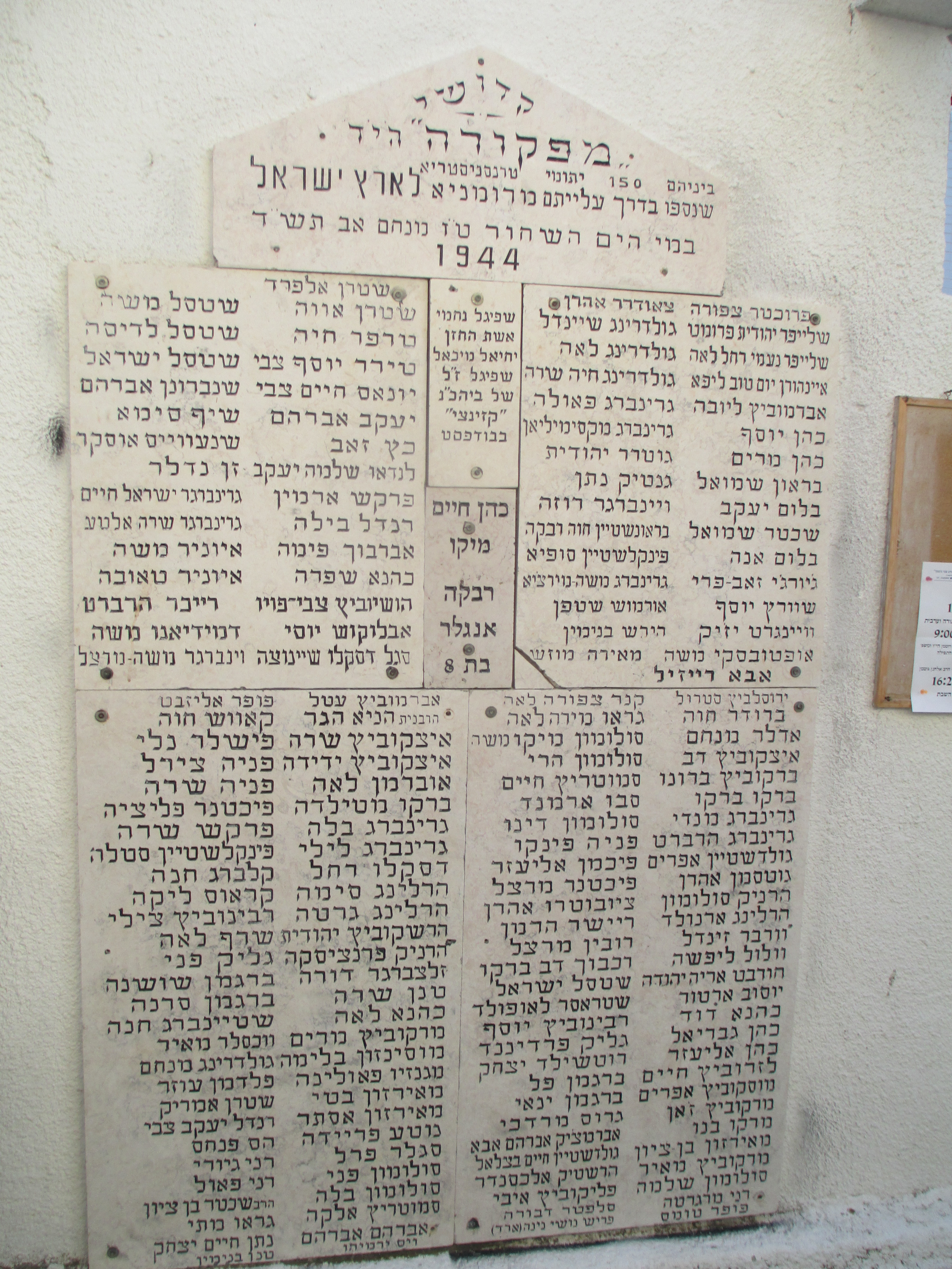 לוח זיכרון לנספים בספינה מפקורה - בבית הכנסת בית יעקב יוסף - הרב צבי גוטמן ברחוב פקיעין 12א בתל אביב